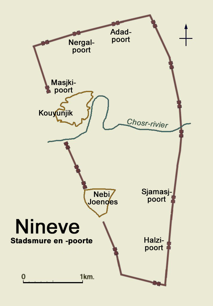 Stadsmure en -poorte van Nineve